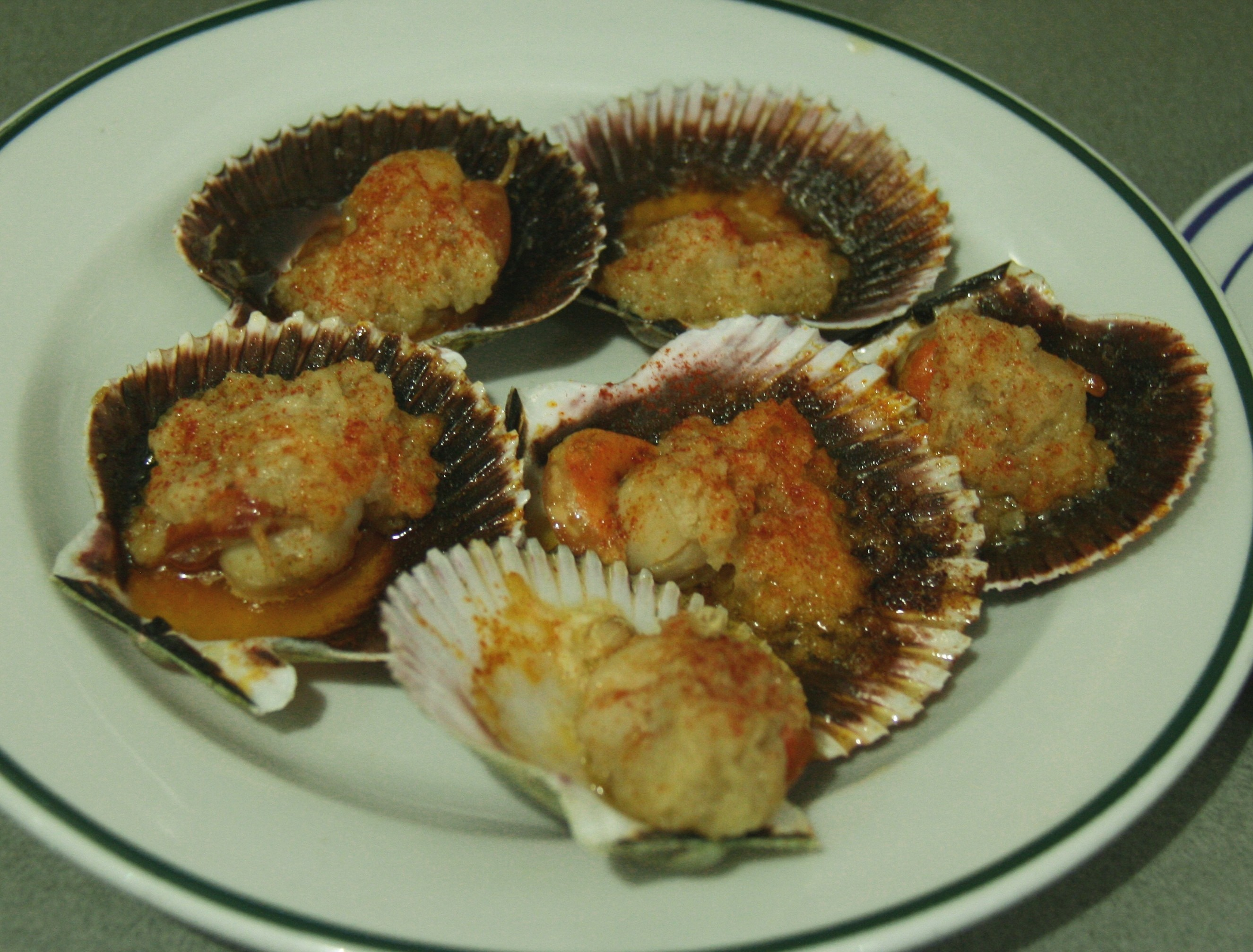 Zamburriñas